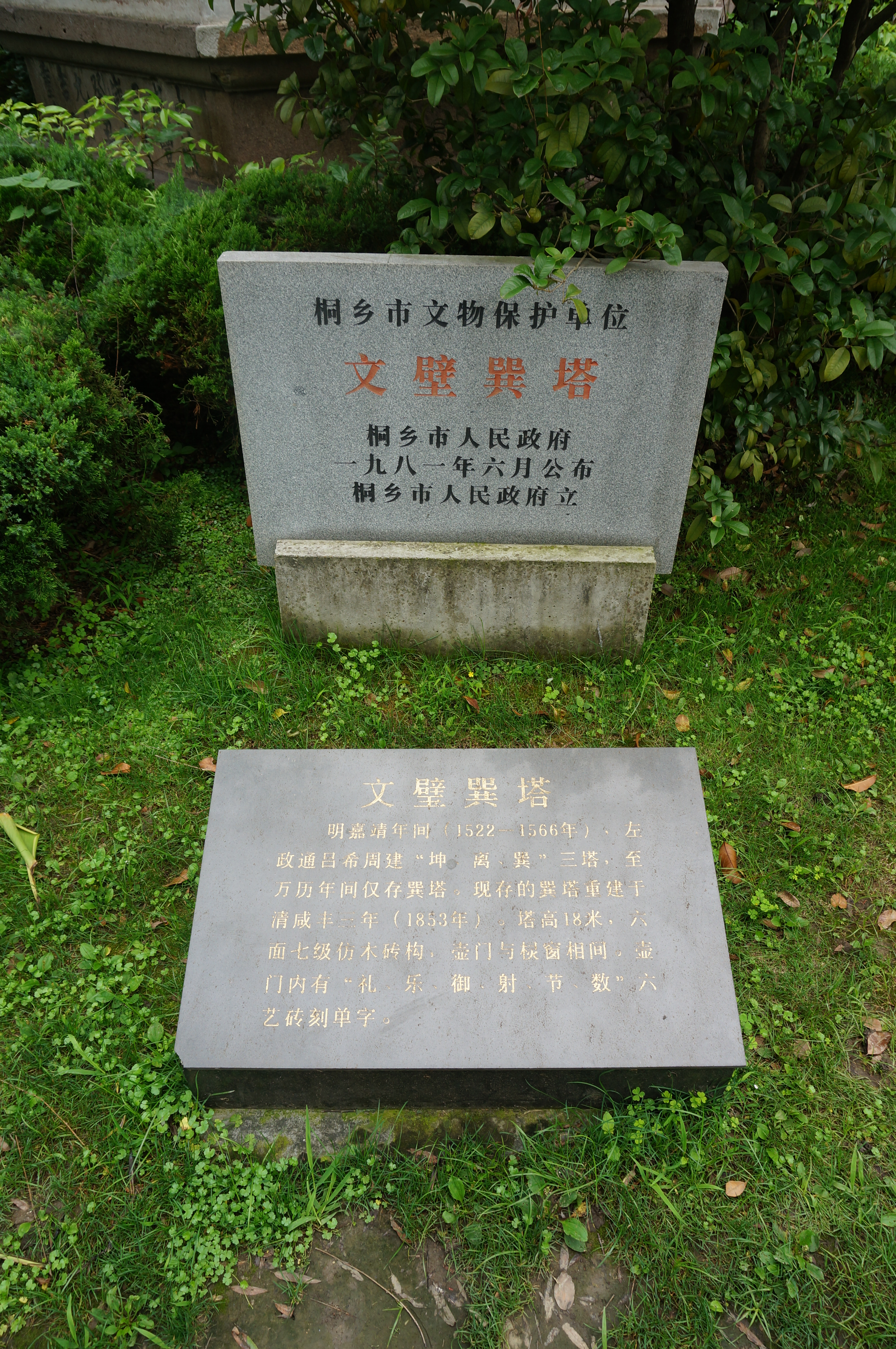 崇福镇文璧巽塔，文保碑及介绍。